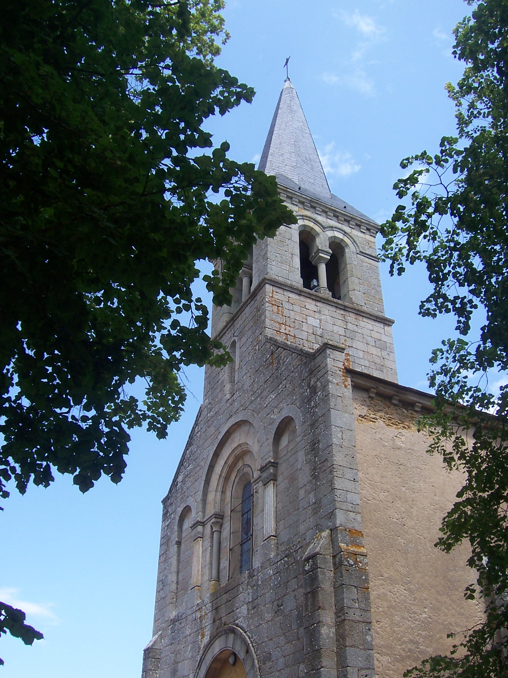 Eglise de Saint Marcelin de Cray